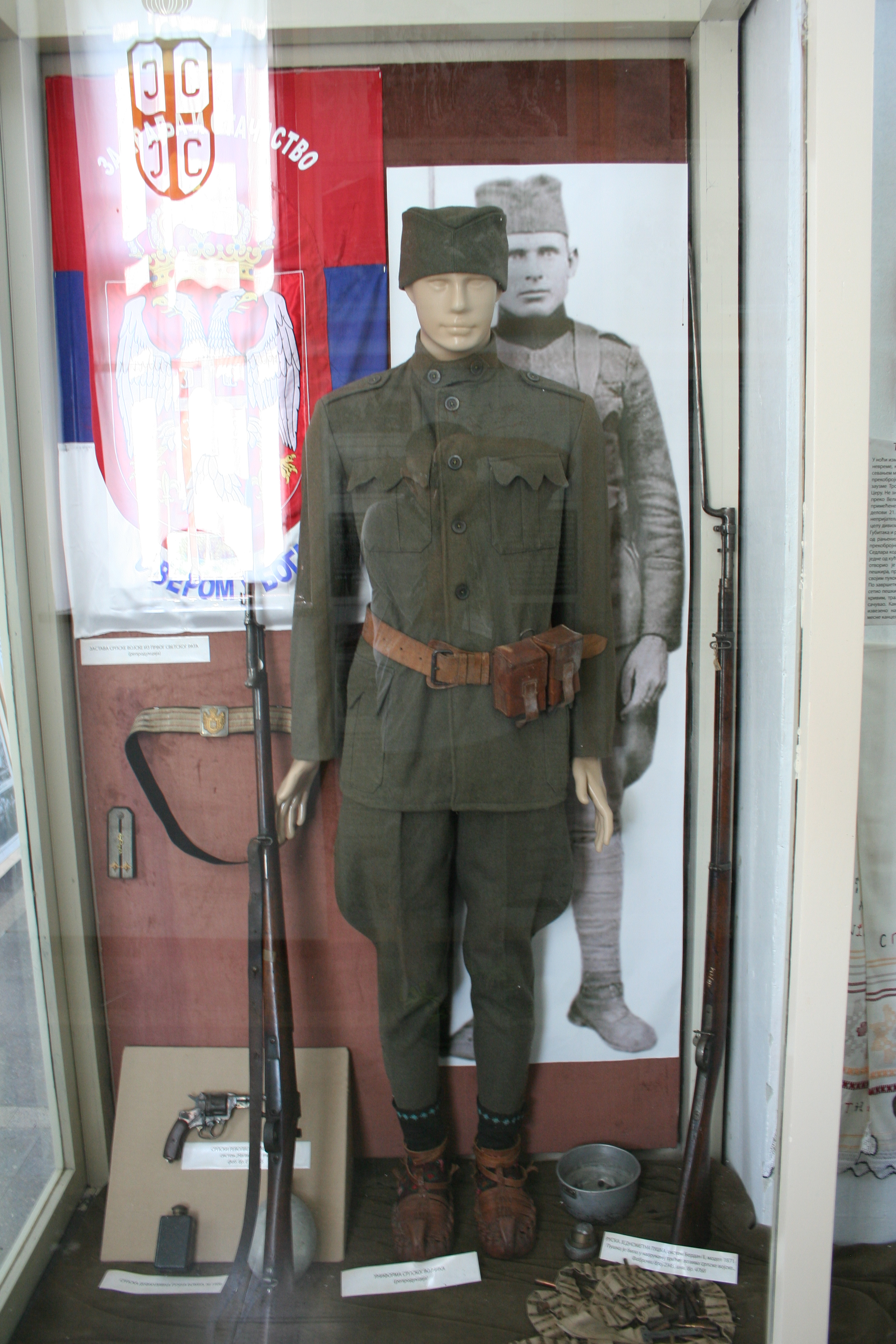 Spomen-kosturnica na Ceru